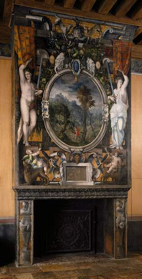 L'une des douze cheminées peintes du Château d'Ecouen (Val d'Oise). Il s'agit de la cheminée de la chambre d'Anne de Montmorency, bâtisseur du Château.